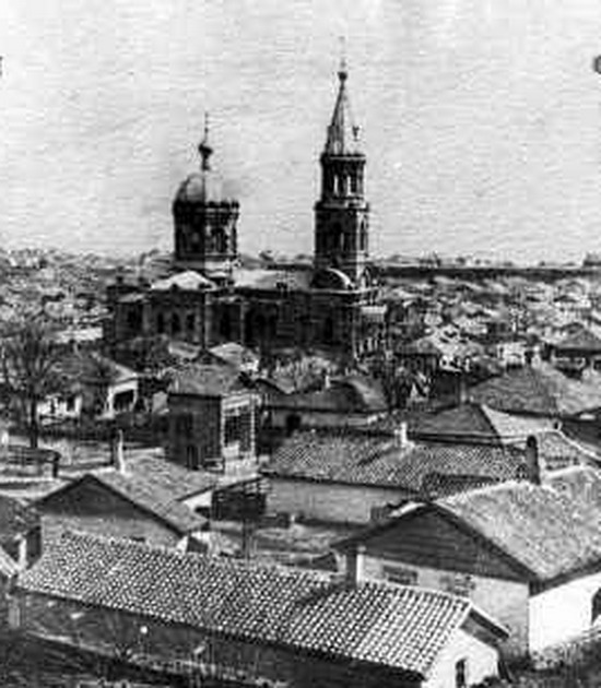 Маріуполь Черепичні дахи (фрагмент)